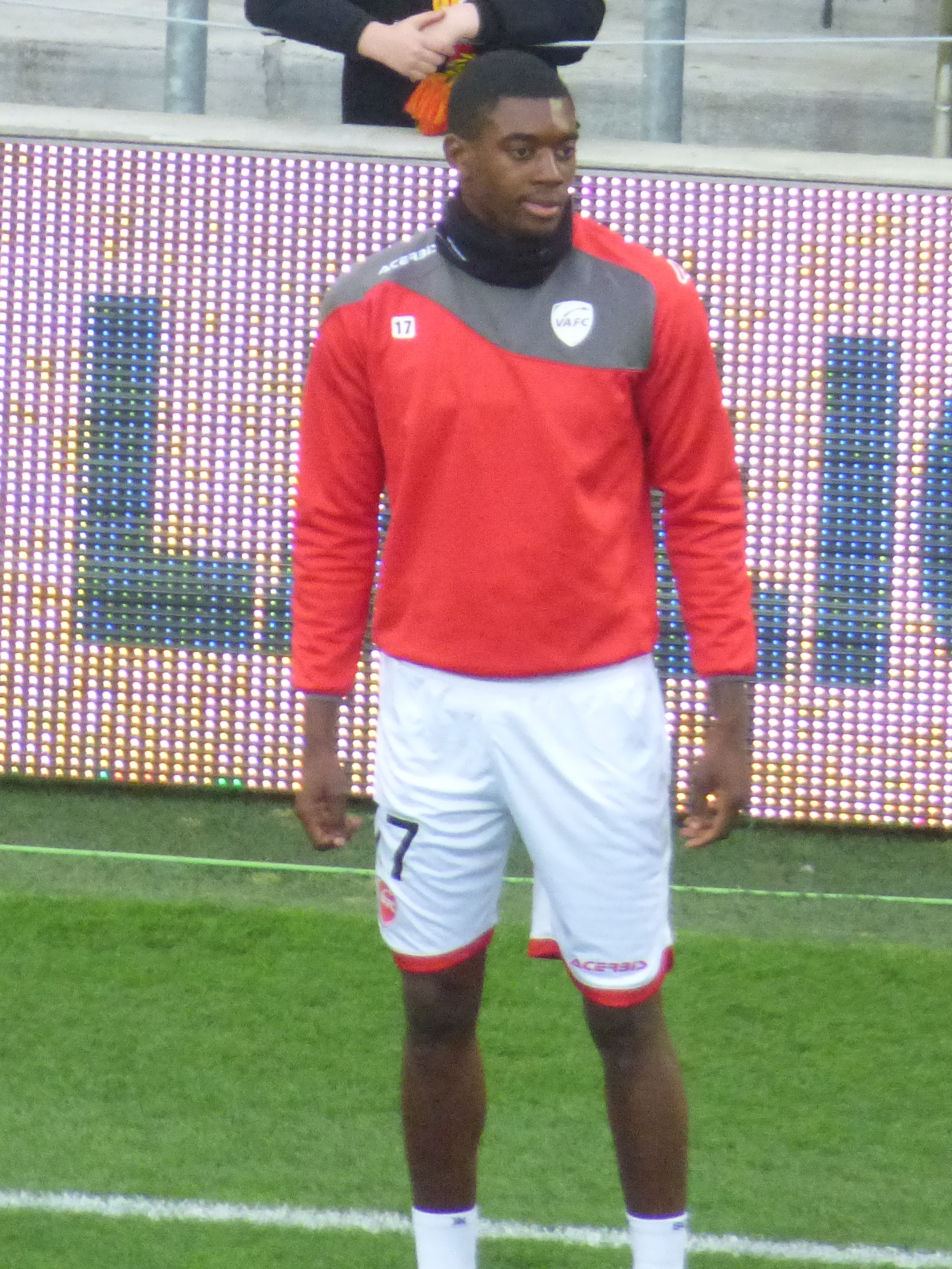 Jorris Romil avant le match Lens-Valenciennes, comptant pour la 32ème journée du championnat de France de football de Ligue 2 2018-2019, le 12 avril 2019, au Stade Bollaert-Delelis.